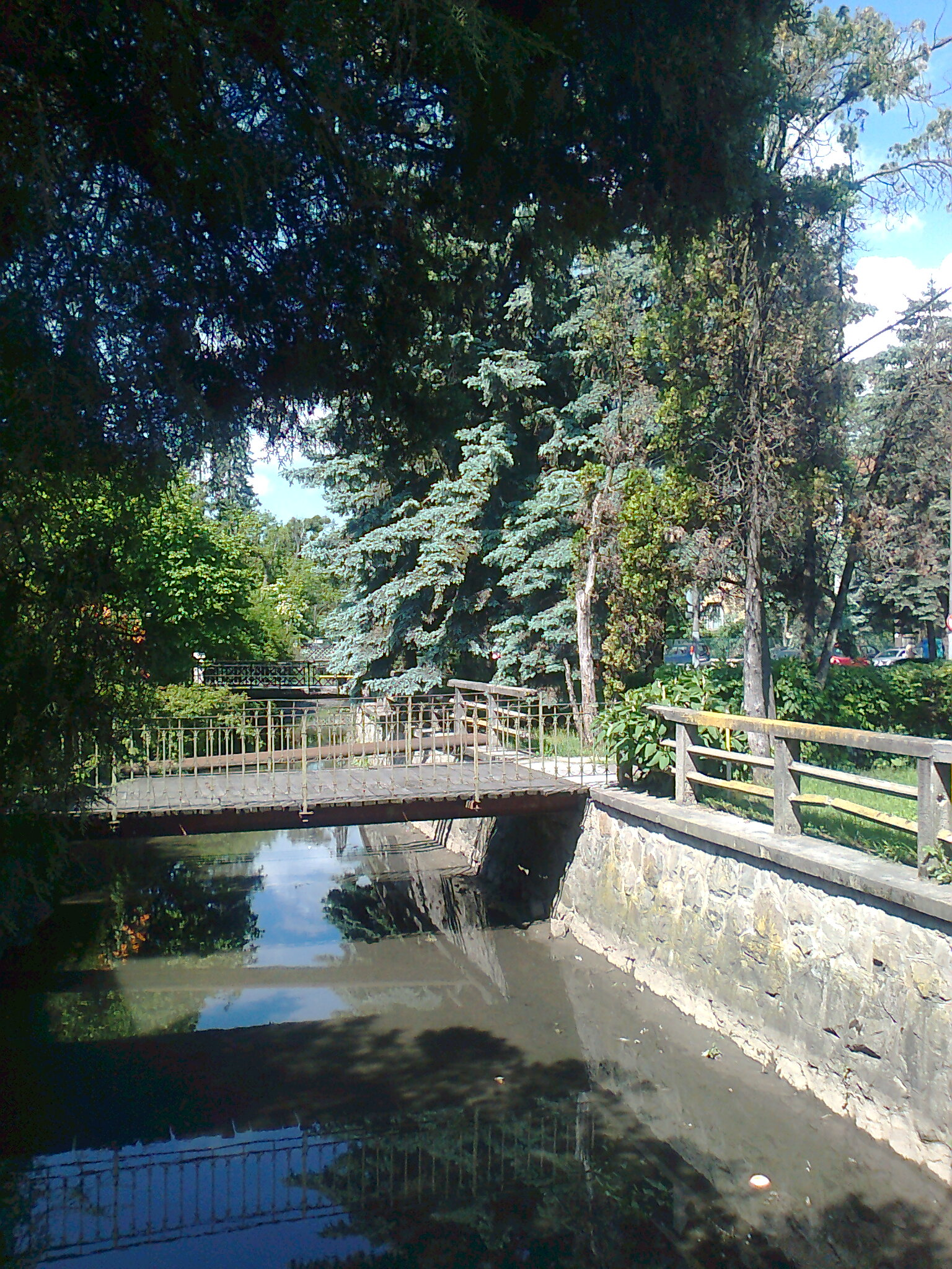 Malomárok in Kolozsvár (Cluj-Napoca)/ Malomárok Kolozsváron